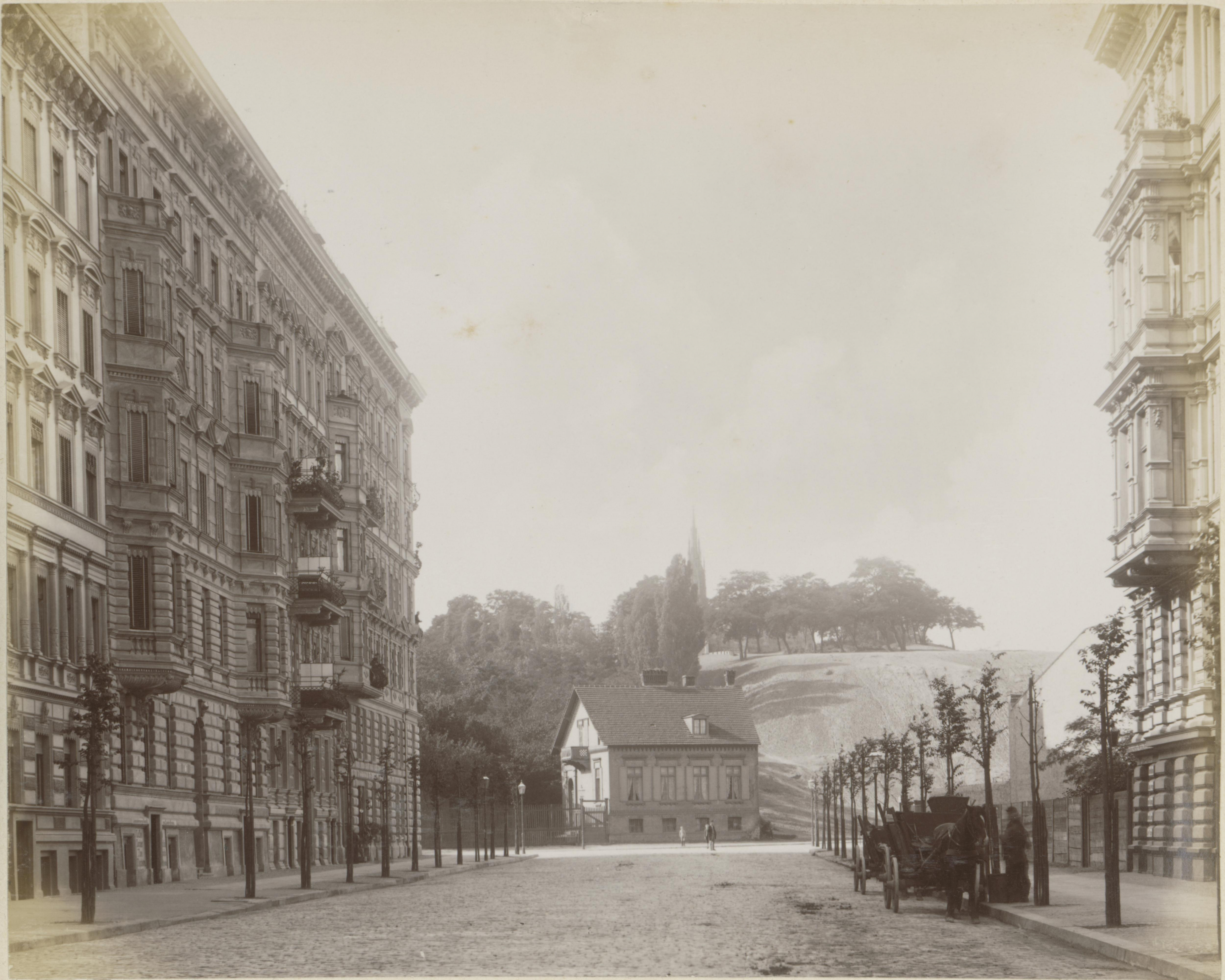 Kreuzberg in Berlin, seen from Großbeerenstraße, 1887